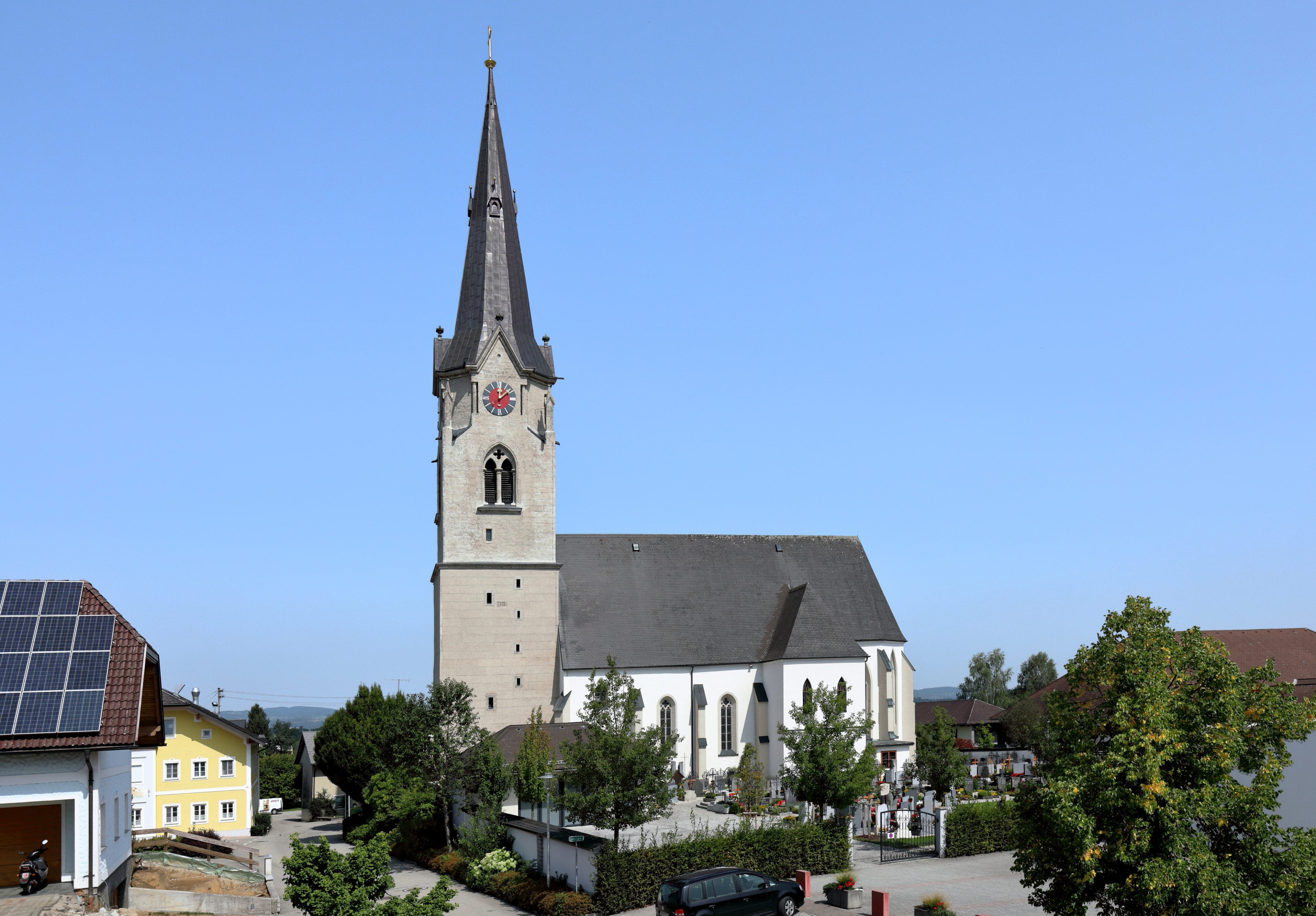 Ortszentrum der oberösterreichischen Gemeinde Gampern mit der ortsbildbeherrschenden röm.-kath. Pfarrkirche hl. Remigius. Die zweischiffige spätgotische Hallenkirche wurde von 1480 bis 1486 gebaut. Anfang des 16. Jahrhunderts erfolgte die Errichtung des mächtigen gotischen Westturmes bis zur Dachgleiche und 1890 der Ausbau auf eine Höhe von 63 m.